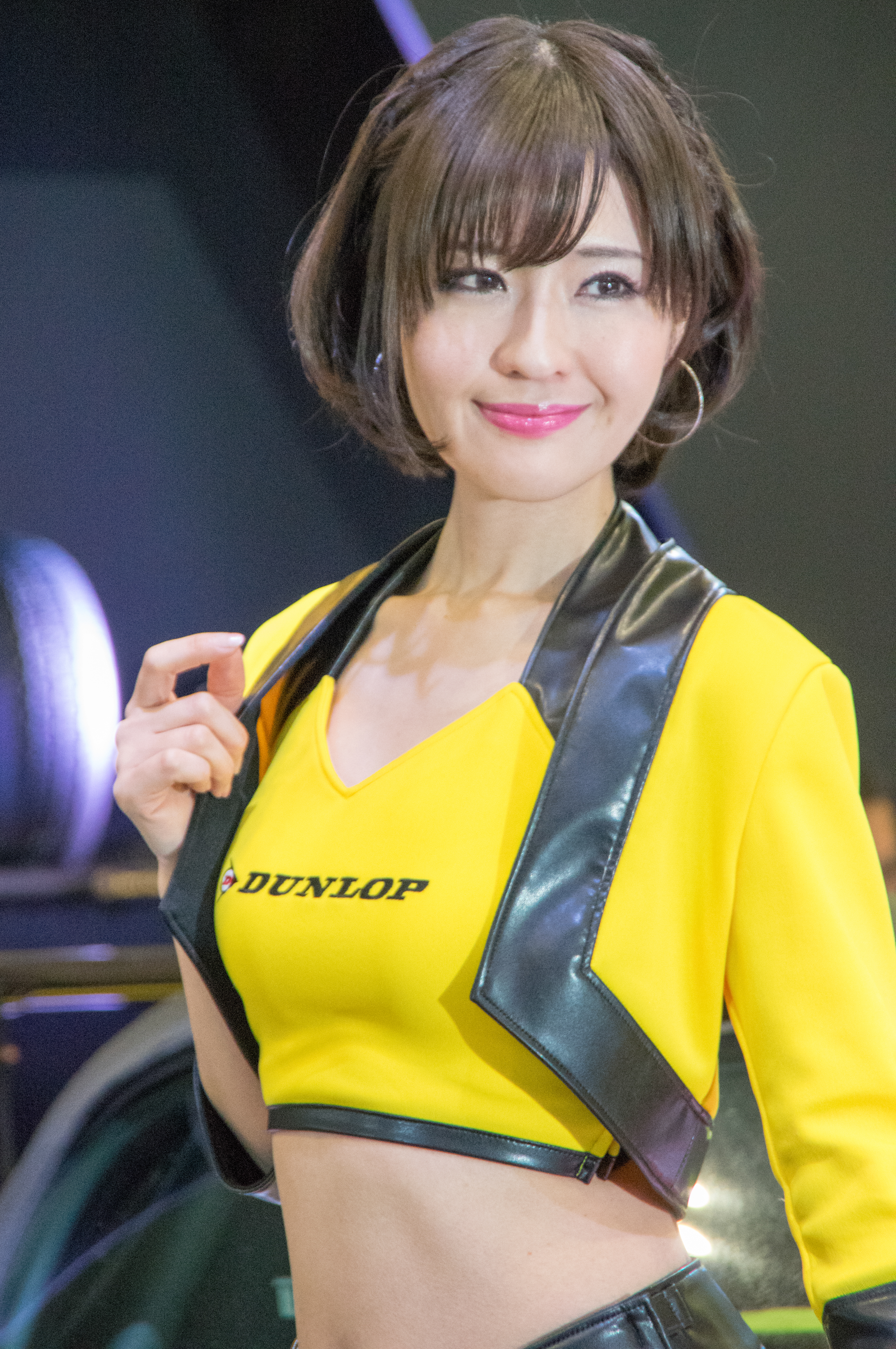 TOKYO AUTO SALON 2017 （東京オートサロン2017）-165.jpg